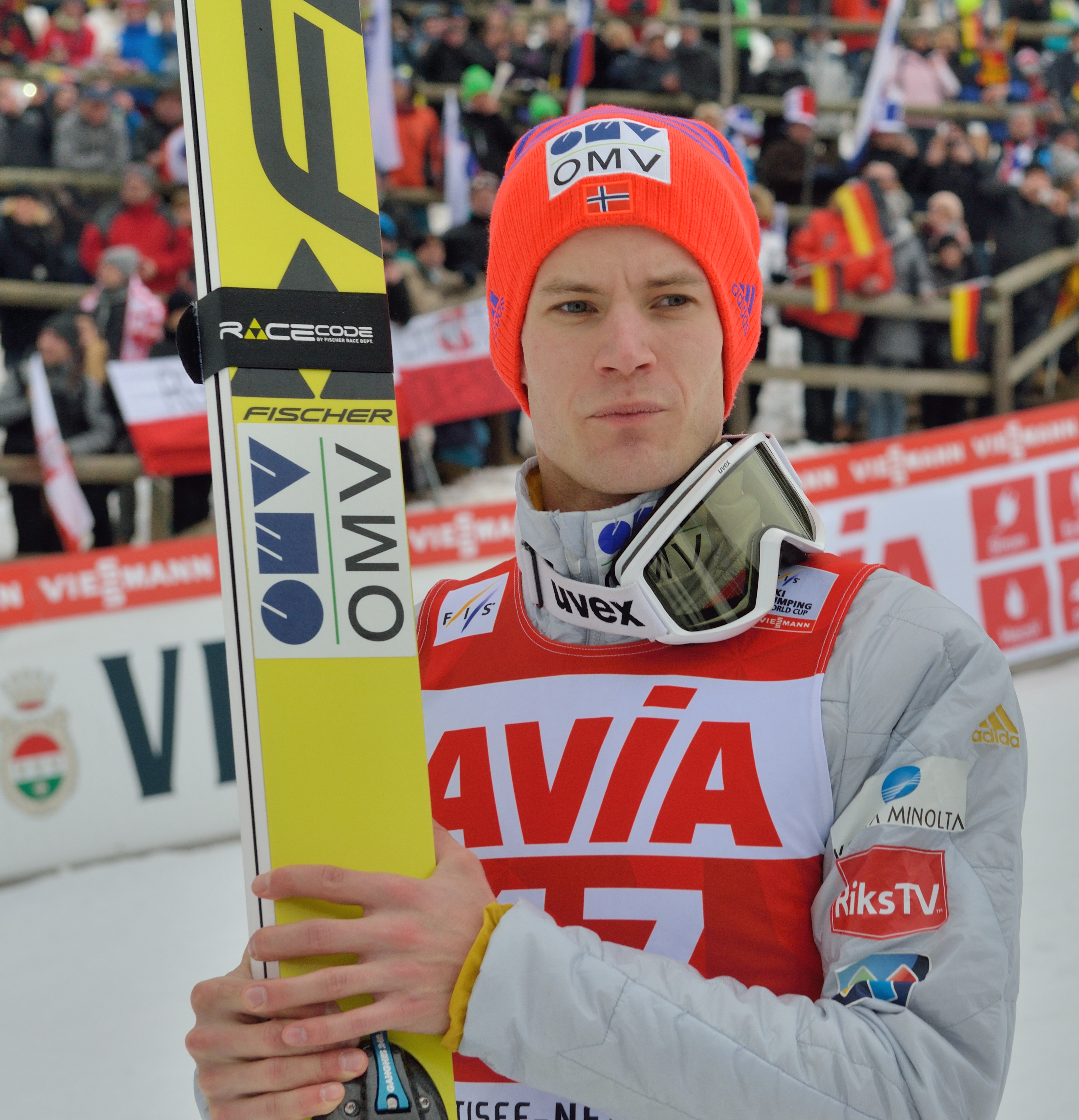 FIS Ski Weltcup Titisee-Neustadt 2016: Kenneth Gangnes